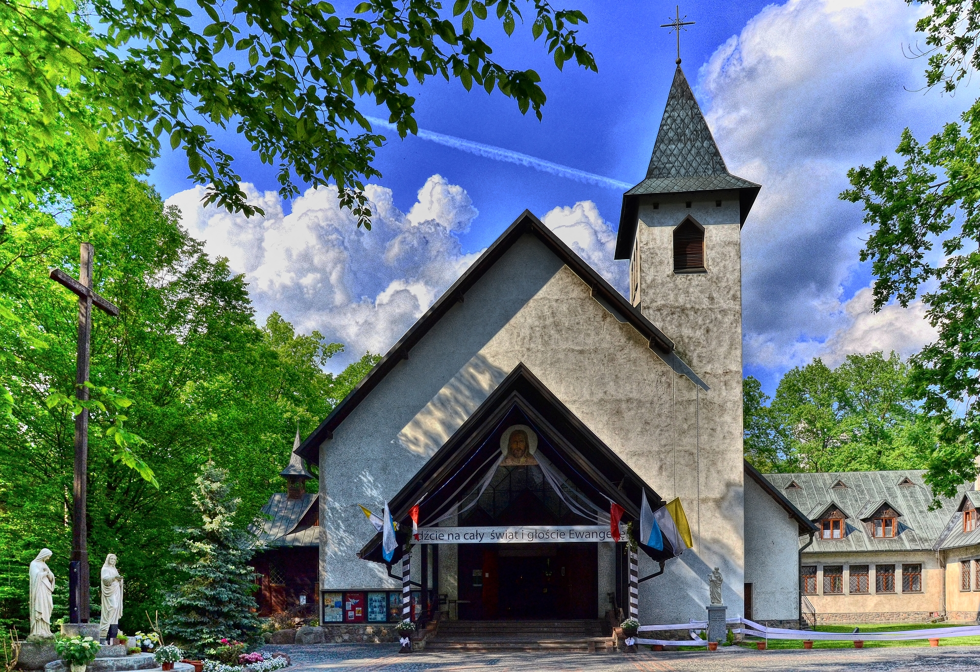 Kościół parafialny Św. Huberta w Zalesiu Górnym, powiat piaseczyński, woj. mazowieckie.